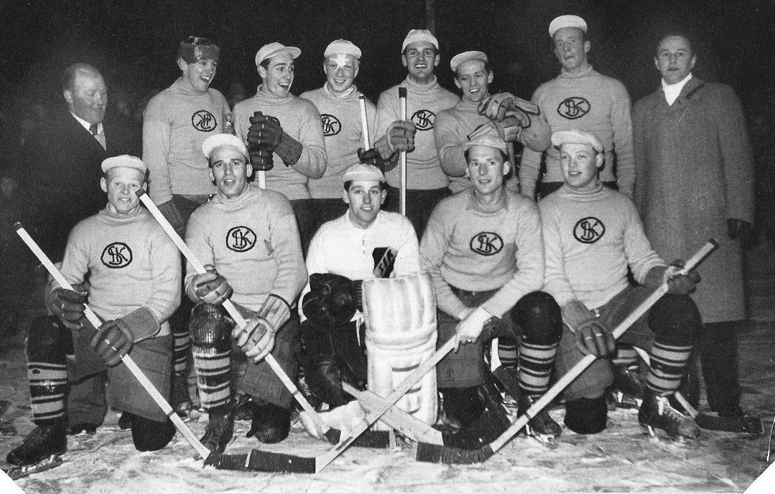 Sjödalens IK 1949. Bakre raden: Hugo Johansson, Karl-Erik Andersson, Olle Olsson, Inge Nyberg, Stig Eriksson, Arne Fagerberg, Ebbe Rydén och E Skoglund. Främre raden: Ulf Rydén, Rune Nordberg, Sören Åberg, Börje Svensson och Olle Rydén.